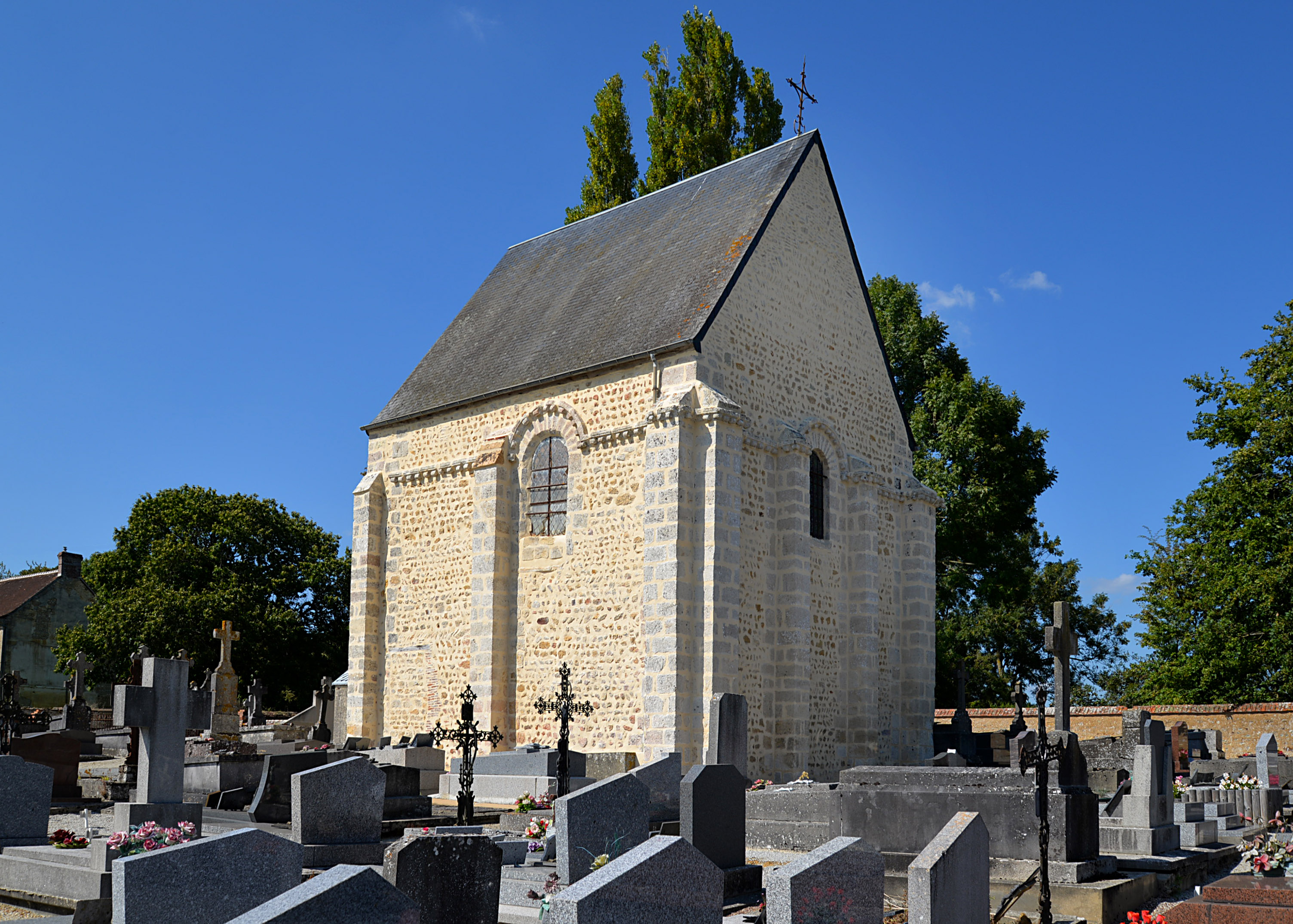 Courtomer [Le Vieux-Courtomer] (Orne)